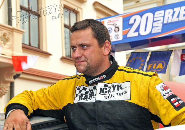 Zakończenie 20 Rajdu Rzeszowskiego